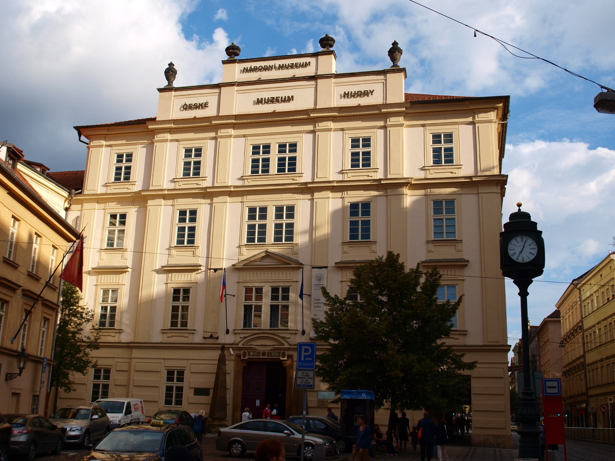 Budova Českého muzea hudby